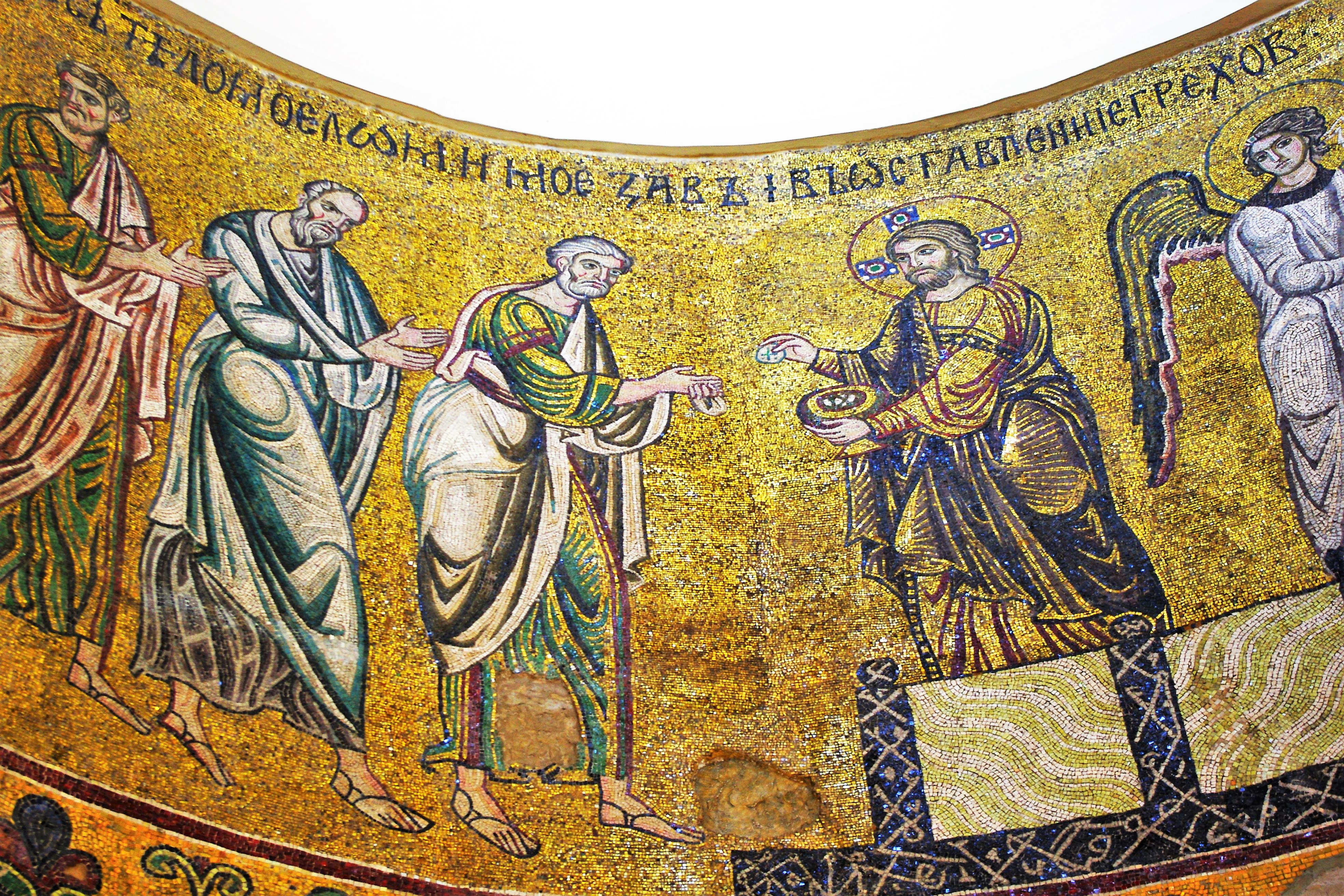 Sobór Mądrości Bożej (Sofijewski) w Kijowie: mozaika Eucharystia z kijowskiego monasteru św. Michała Archanioła o Złotych Kopułach, zniszczonego w latach 30. XX wieku